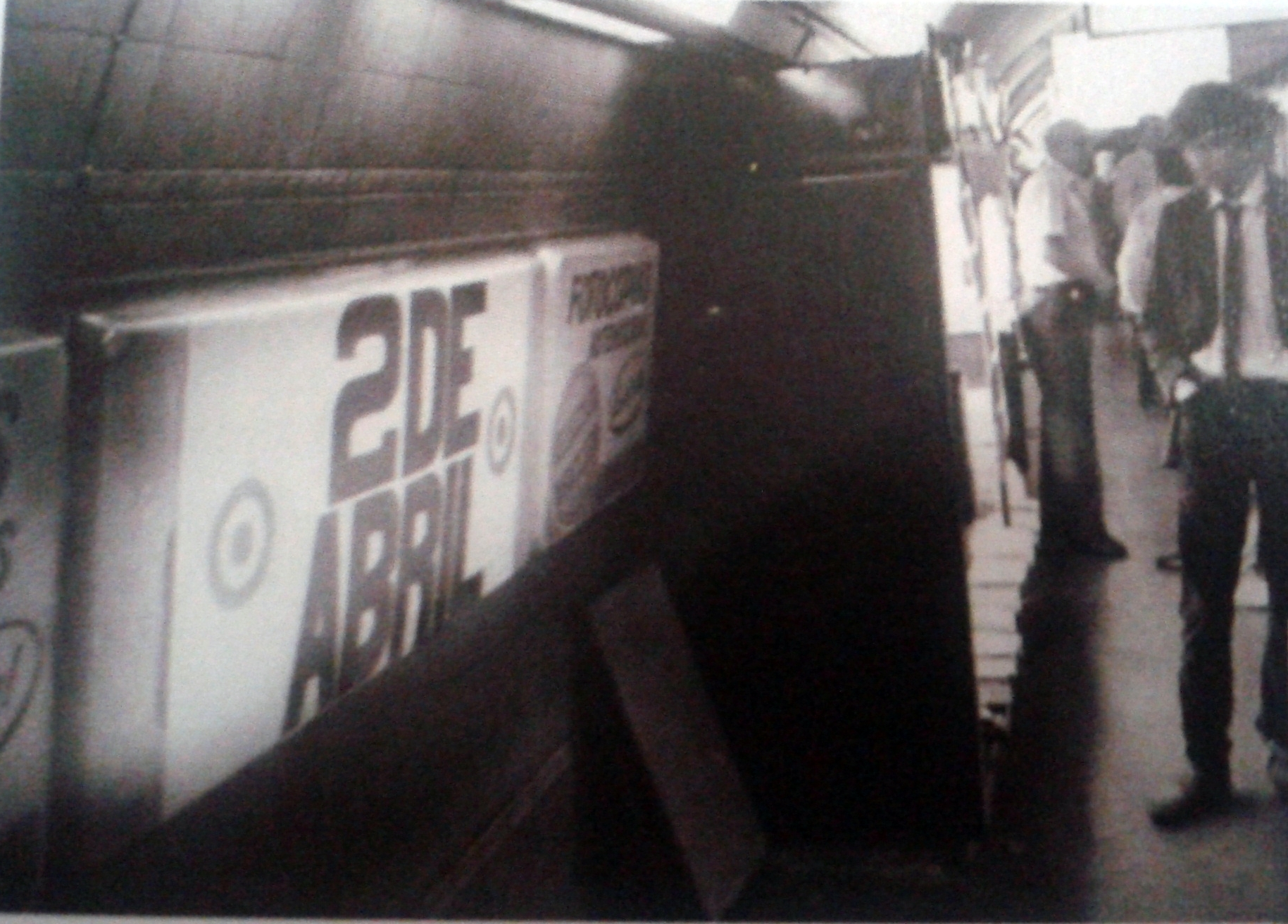 Estación Canning (actual Scalabrini Ortiz, de la línea D) renombrada como "2 de abril" con motivo del éxito de la Operación Rosario.